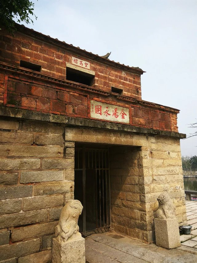 福建安海安平桥望高楼